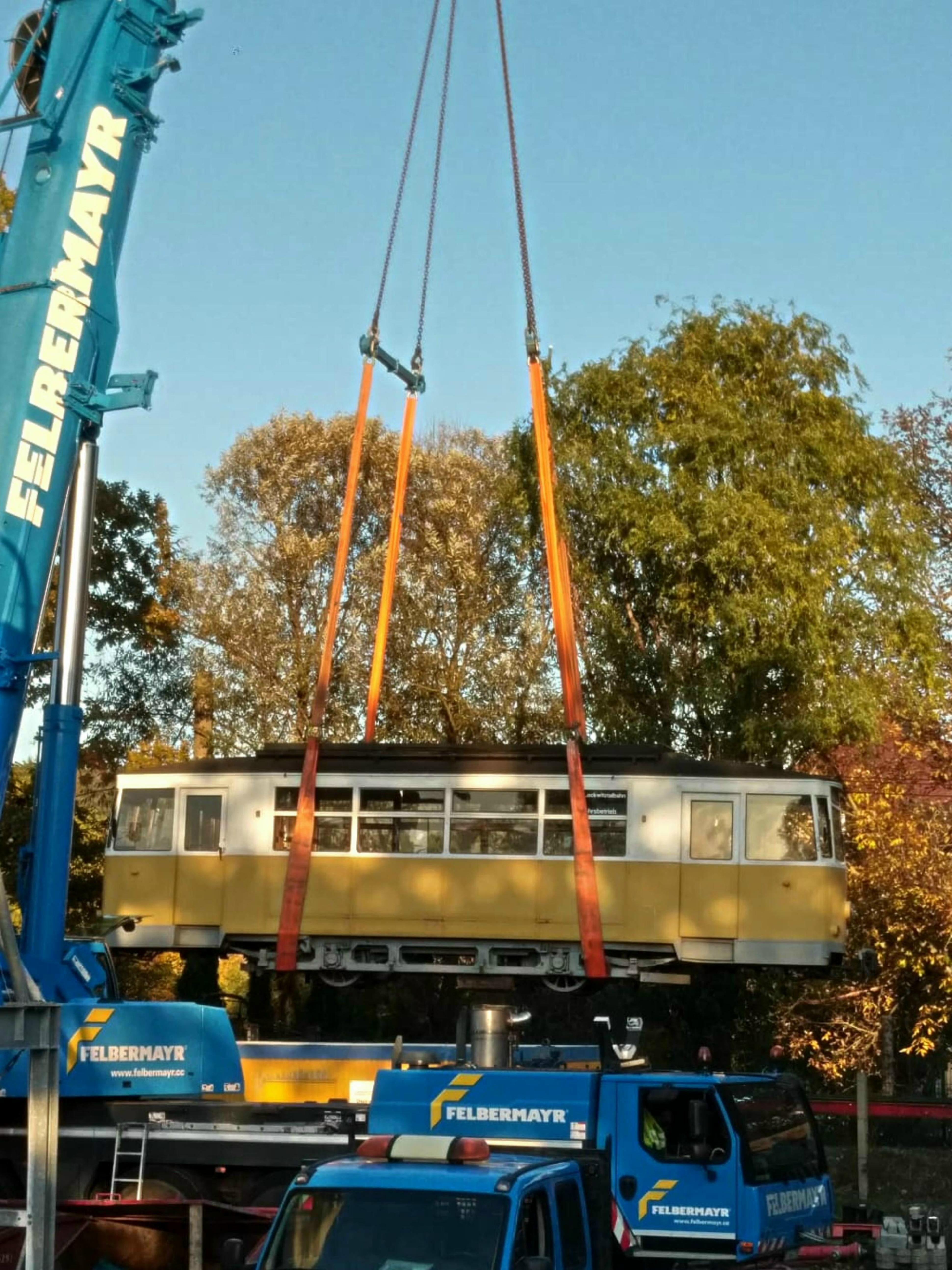 Dresden-Niedersedlitz - Kreischa. Heimkehr des Triebwagens 240 004-1 der Lockwitztalbahn. Der in Erfurt abgestellte Wagen sollte verschrottet werden. Die Bürgerstiftung Kreischa „Wir sind Kreischa!“ hat das mit Unterstützung des Modelleisenbahnclub e.V. Kreischa verhindern können.